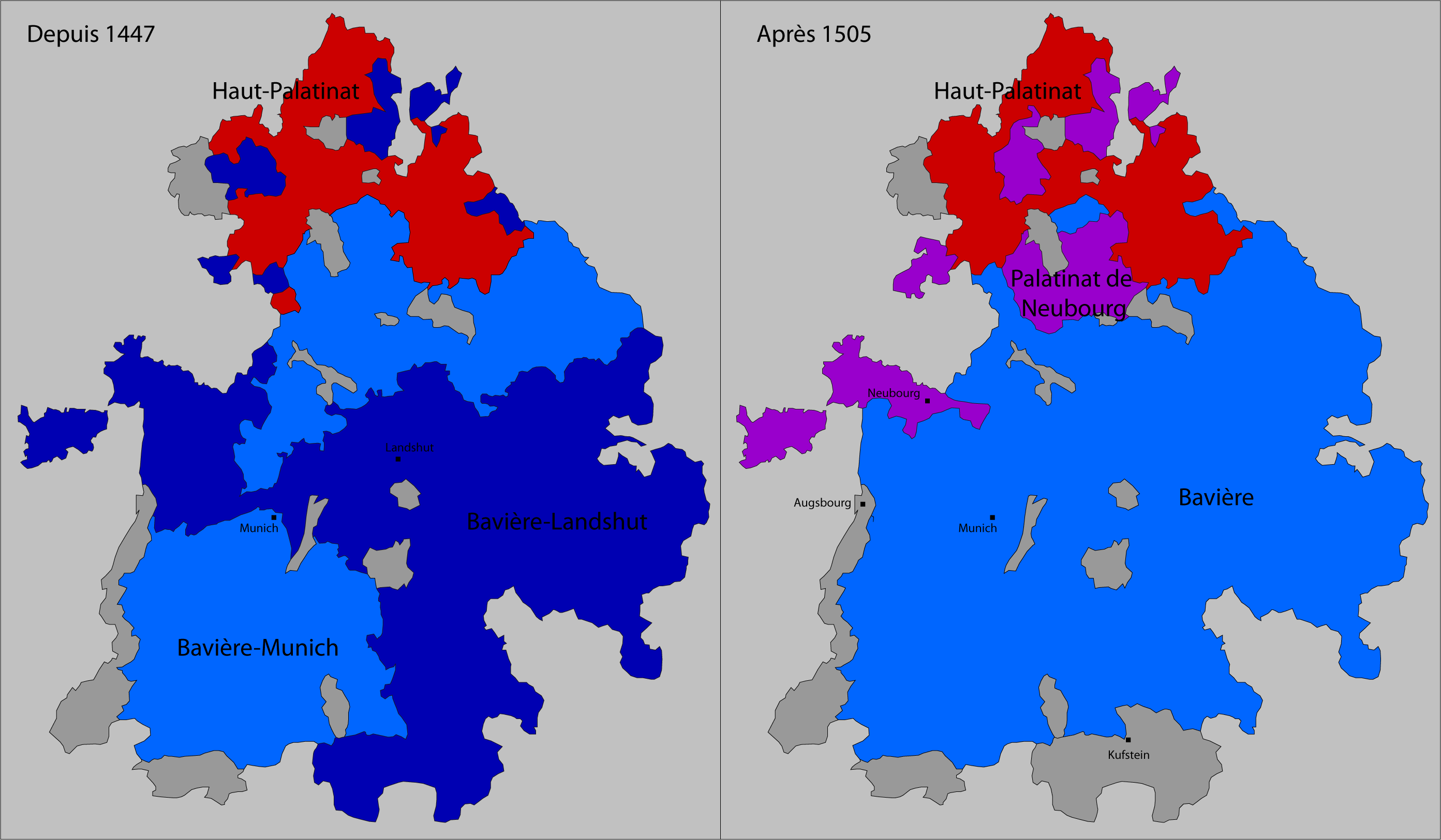 Modifications territoriales dans le cercle de Bavière dans le cadre de la Guerre de succession de Landshut (1503-1505).